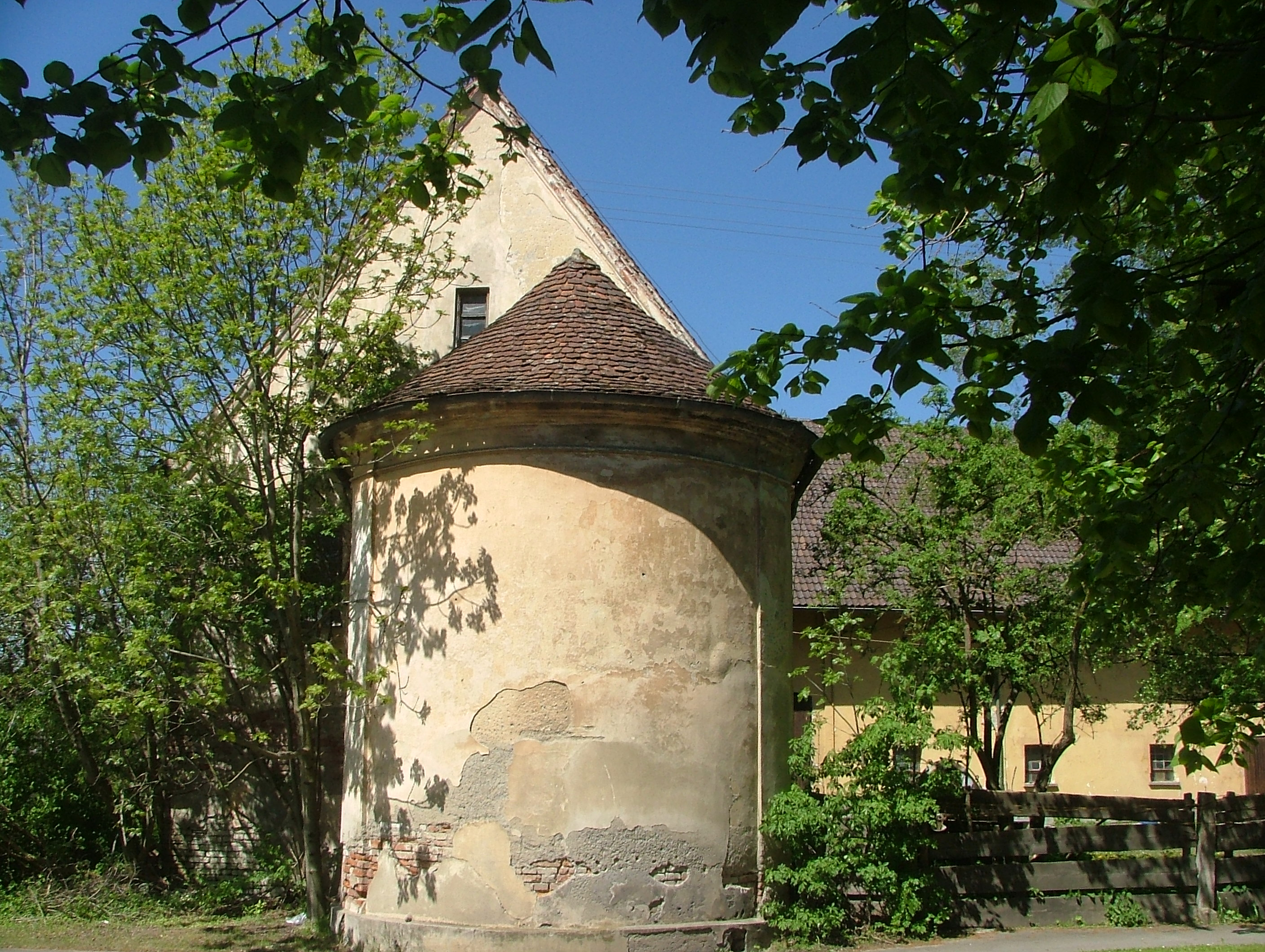 Hofkapelle Boos